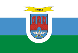 Flaga (chorągiew, proporzec) miasta i gminy Warta.